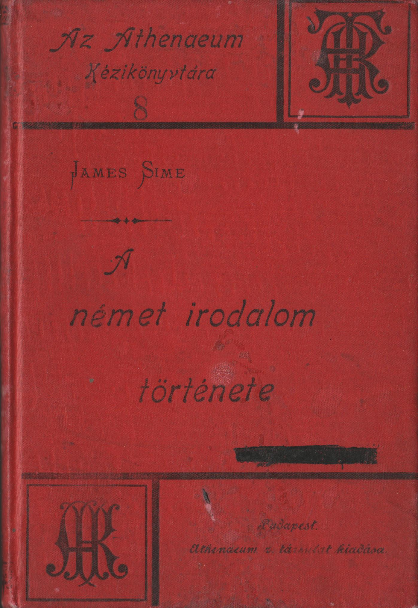 Az adott mű borítója.